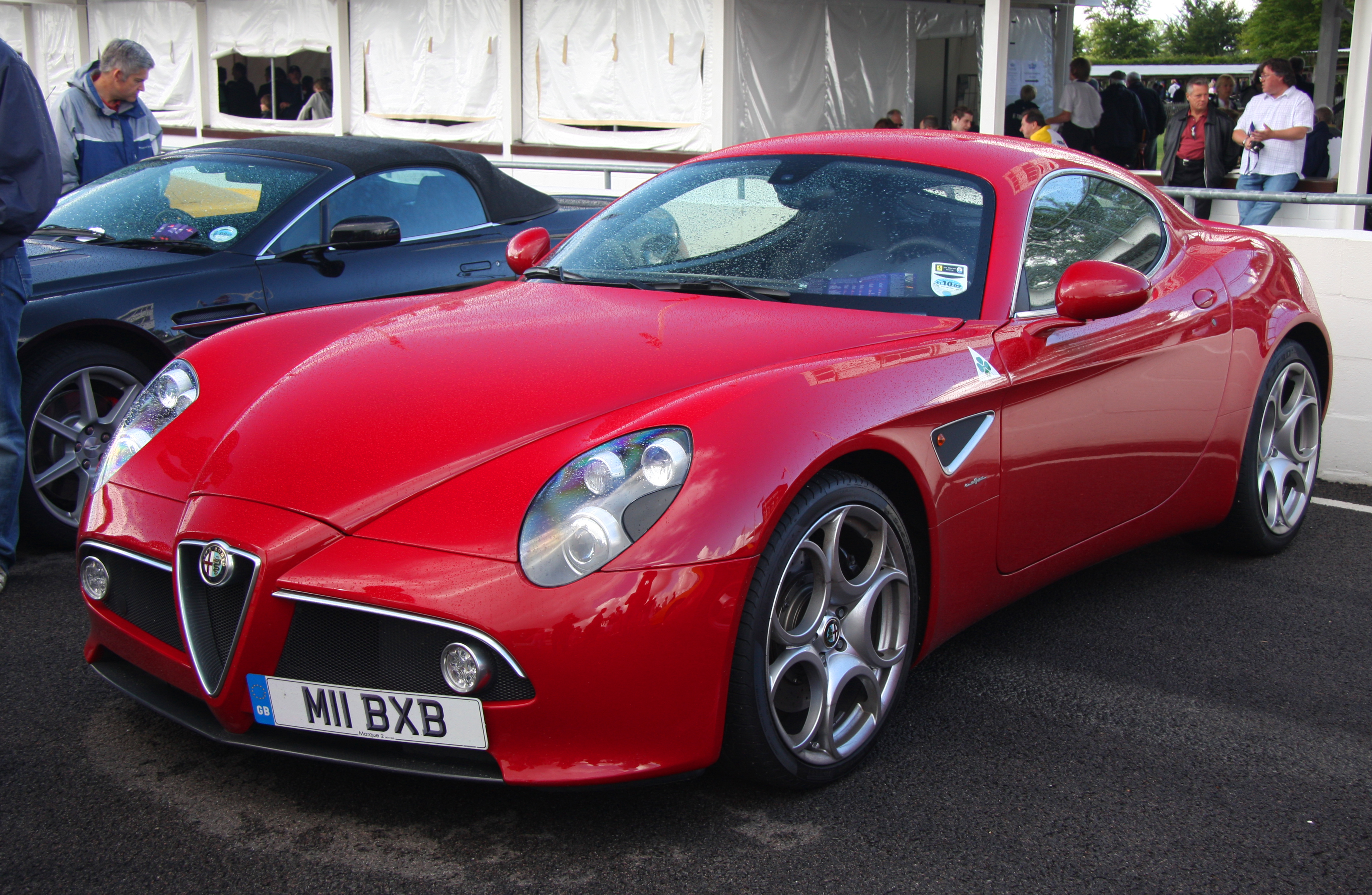 Alfa Romeo 8C Competizione